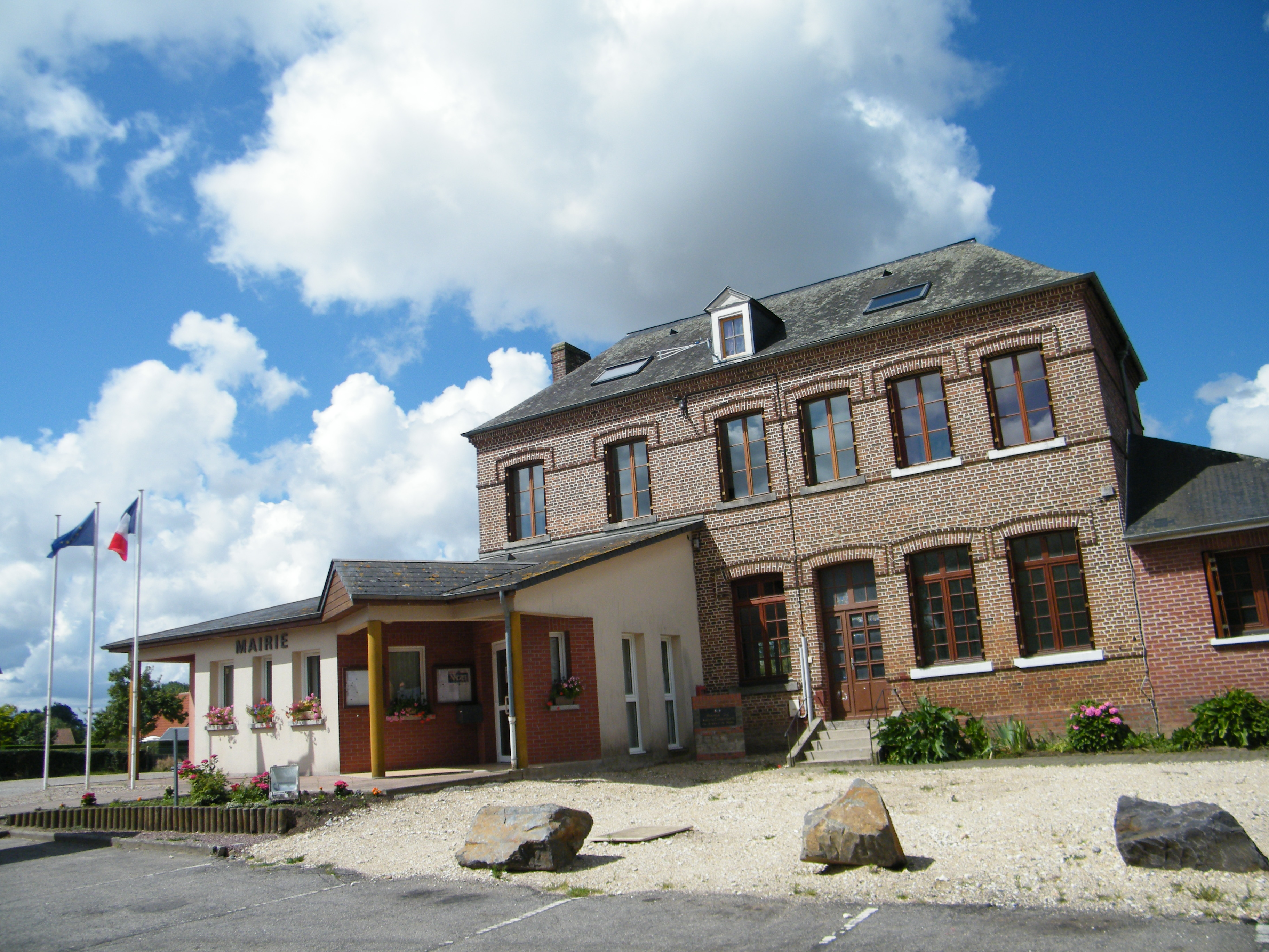 Auquemesnil, Seine-Maritime, France, mairie